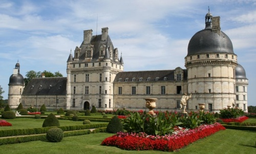 Valençay Castle, France